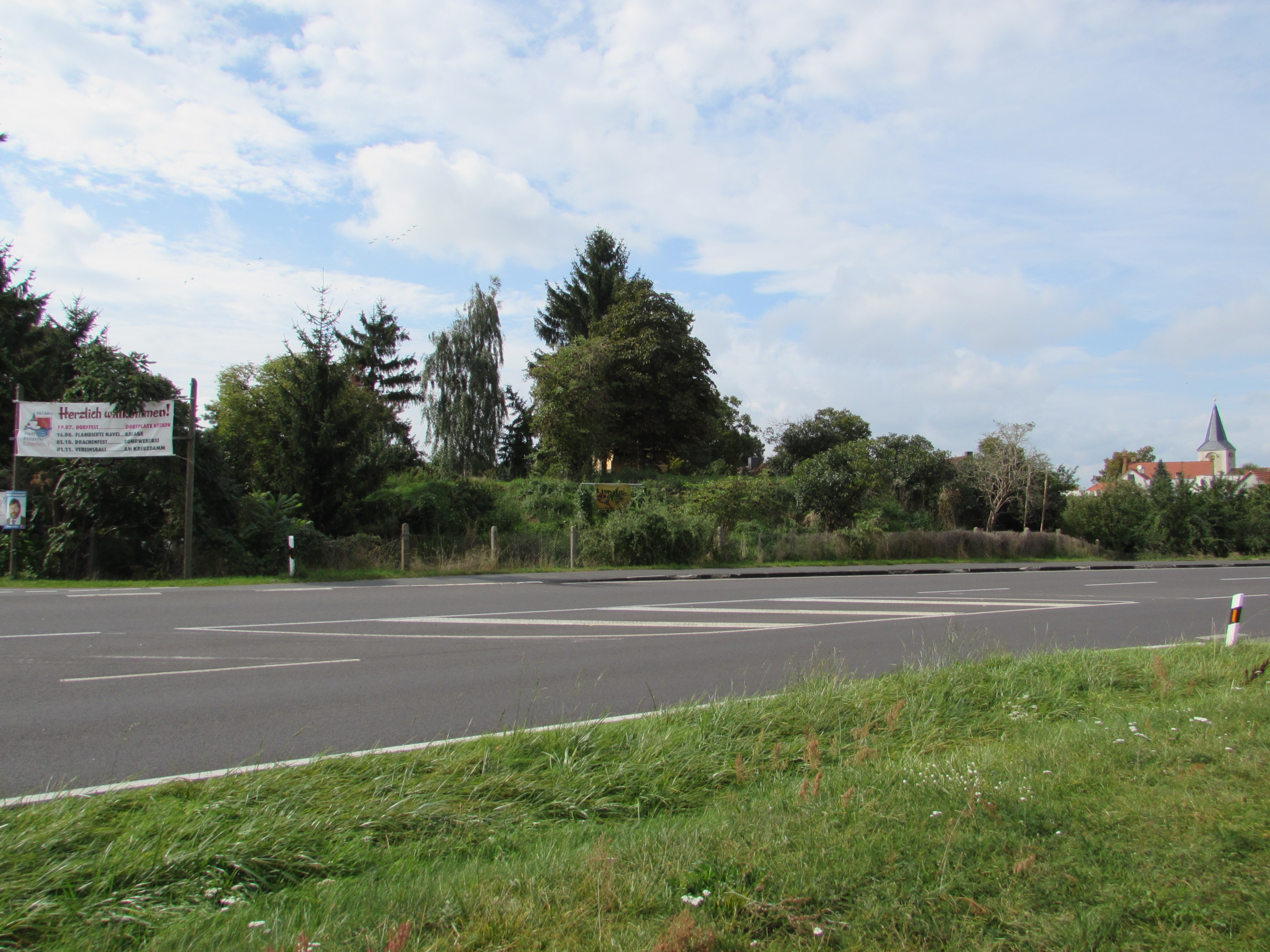 burgstall pritzerbe, mühlenberg